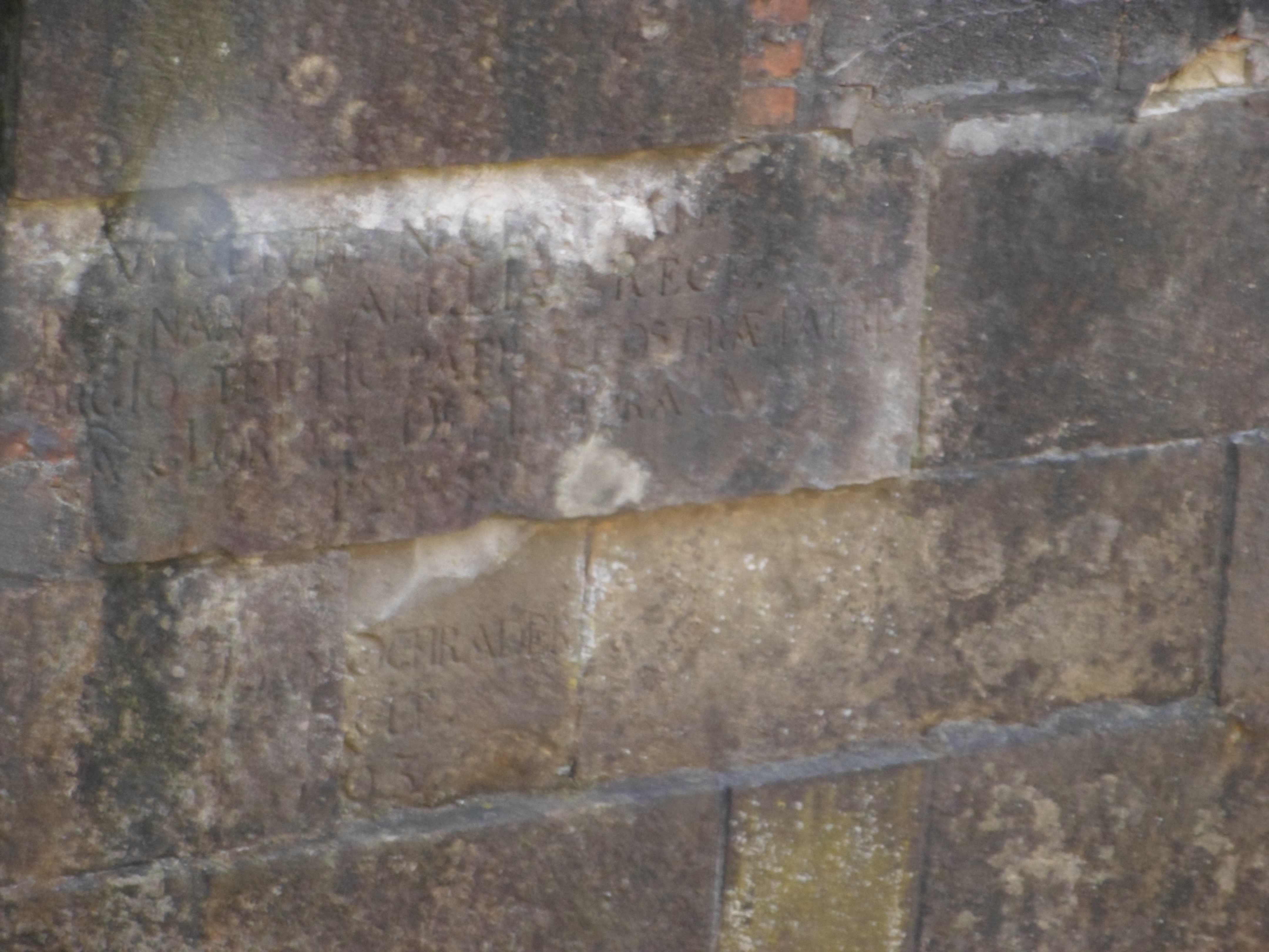 Kornmühle, Nordhorn, Inschrift